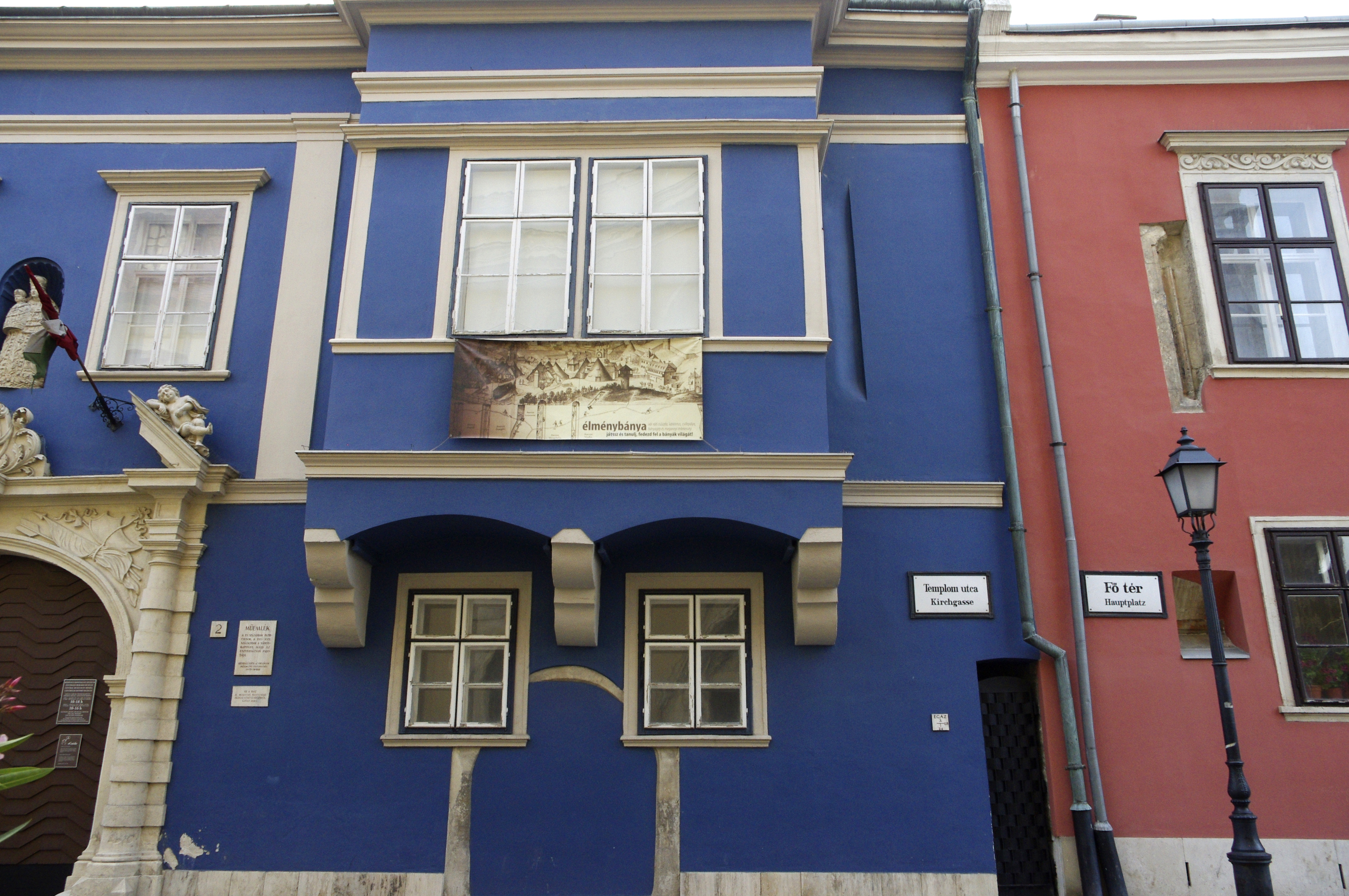 Sopron, Ungarn - letztes Haus (nr 4) Hauptplatz (Fö tér) und erstes Haus (nr 2) Kirchgasse (Templom u.)